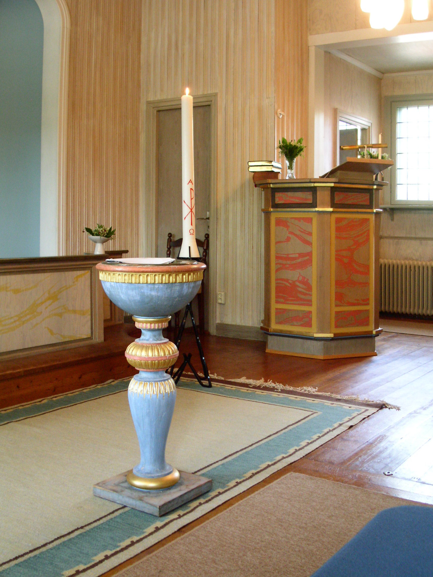 Saxdalens kapell, Grangärde församling.